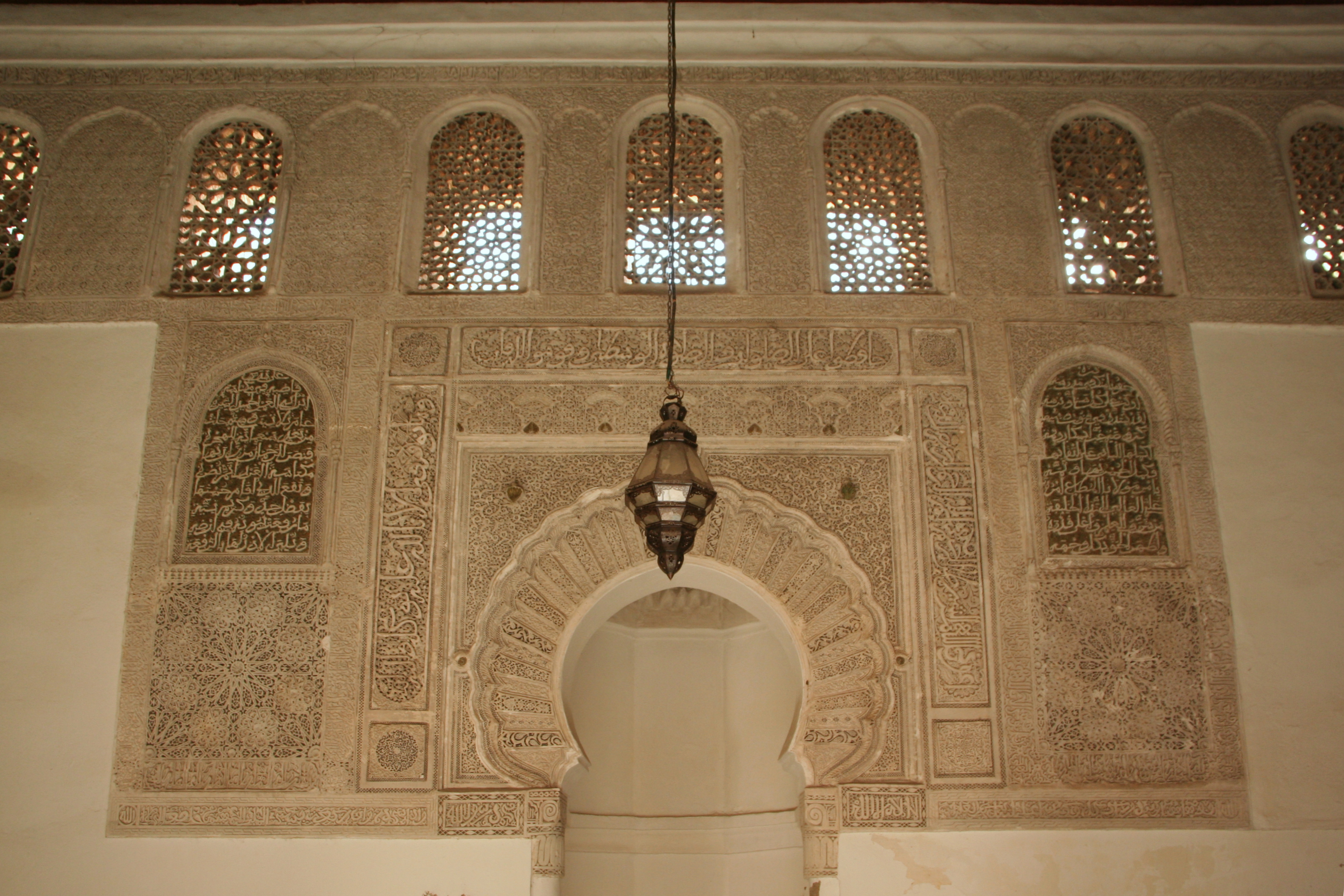 Mihrab in de Madrassa Bou Inania